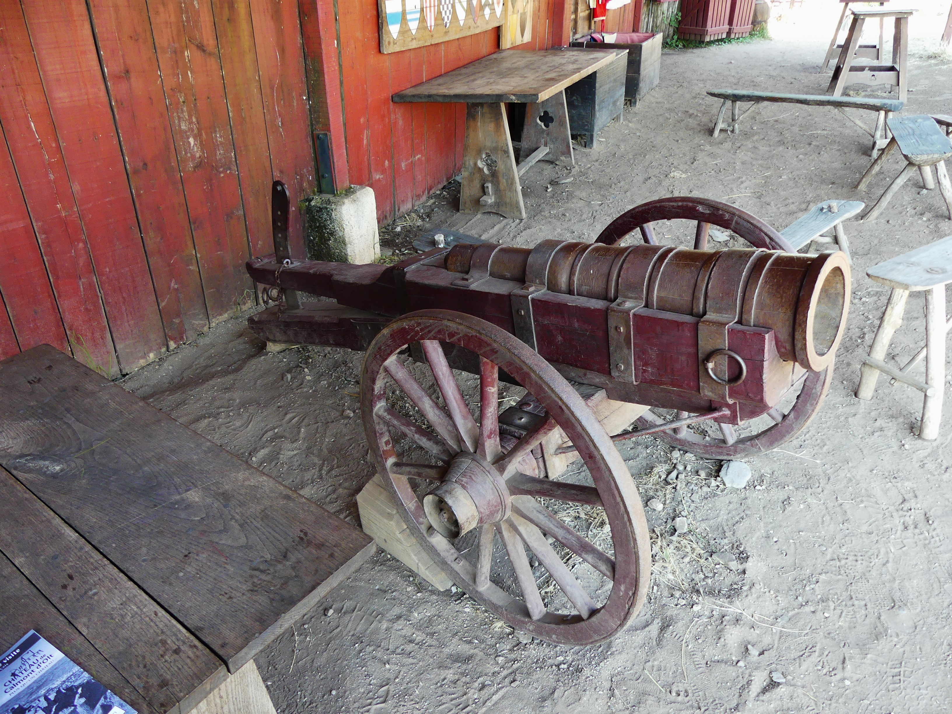 Bombarde au château de Calmont d'Olt, Espalion, Aveyron, France.